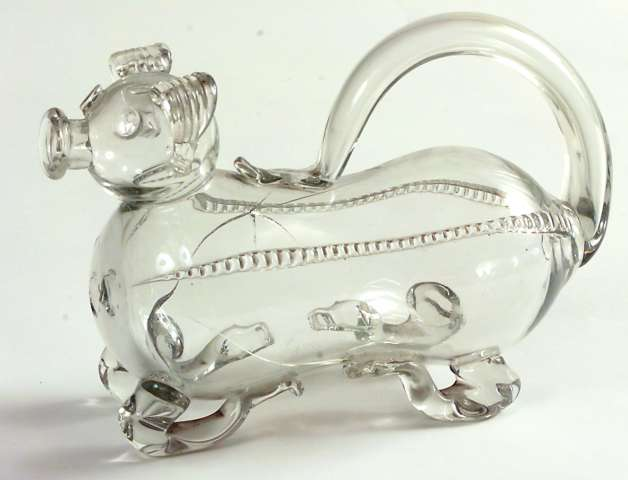 Skjemteflaske eller "fyllehud" fra 1800-tallet, nå i samlingene på Norsk Folkemuseum. Lengde 22.5 cm. NF.1911-1053.